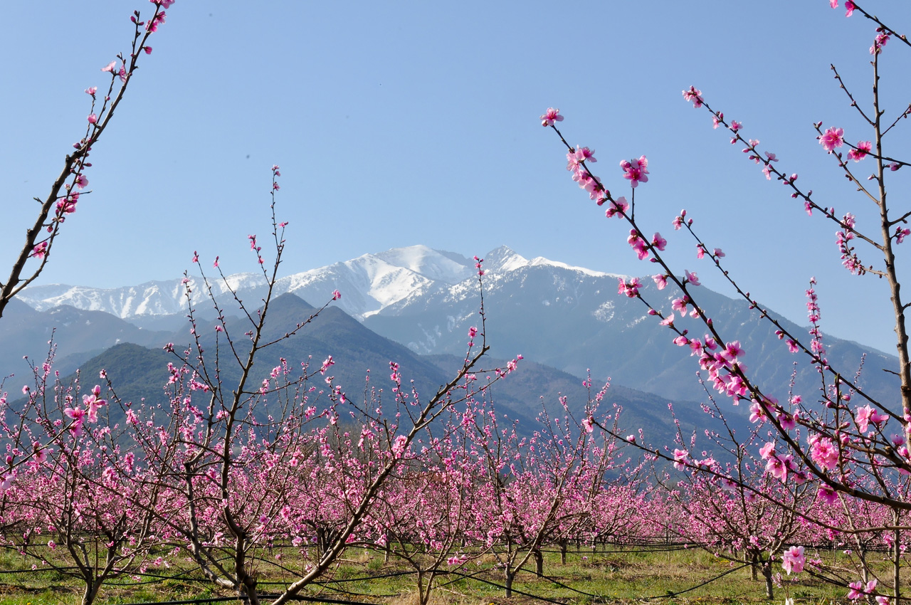 Le Canigou (2784 m) et les pêchers en fleurs